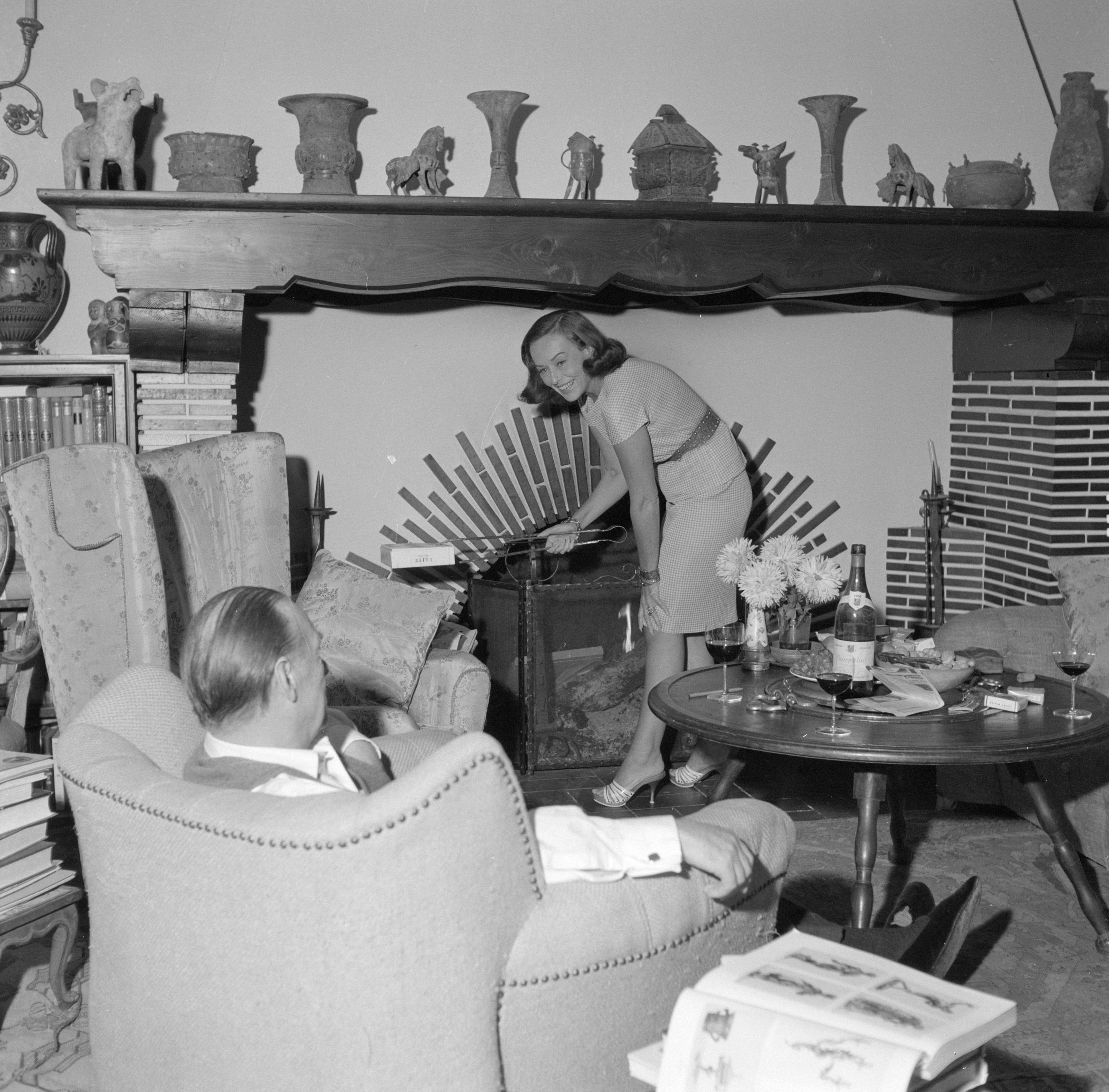 Collectie / Archief : Fotocollectie Van de Poll Reportage / Serie : Bezoek aan de Duitse auteur Erich Maria Remarque en de Amerikaanse actrice Paulette Goddard in hun villa in het Zwitserse Porto Ronco Beschrijving : Het echtpaar in hun woonkamer in de villa in Porto Ronco. Erich Maria Remarque zit in een armstoel, zijn vrouw Paulette Goddard maakt vuur in de open haard Datum : oktober 1961 Locatie : Lago Maggiore, Zwitserland Trefwoorden : acteurs, interieurs, schrijvers, woningen Persoonsnaam : Goddard, Paulette, Remarque, Erich Maria Fotograaf : Poll, Willem van de Auteursrechthebbende : Nationaal Archief Materiaalsoort : Negatief (6x6) Nummer archiefinventaris : bekijk toegang 2.24.14.02 Bestanddeelnummer : 254-4747